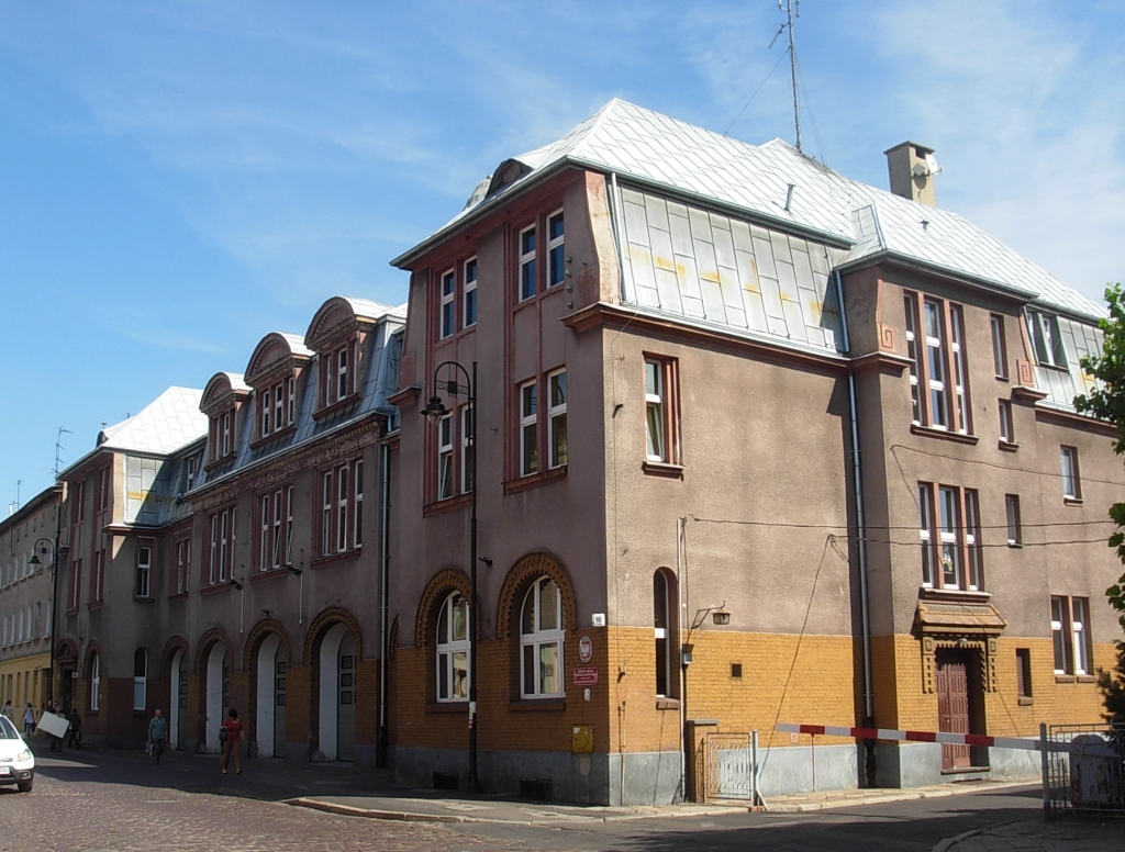 Zespół budynków Straży Pożarnej, ul. Pomorska 18 w Bydgoszczy, 1909-11, nr rej.: A/860/1-2 z 24.11.1994